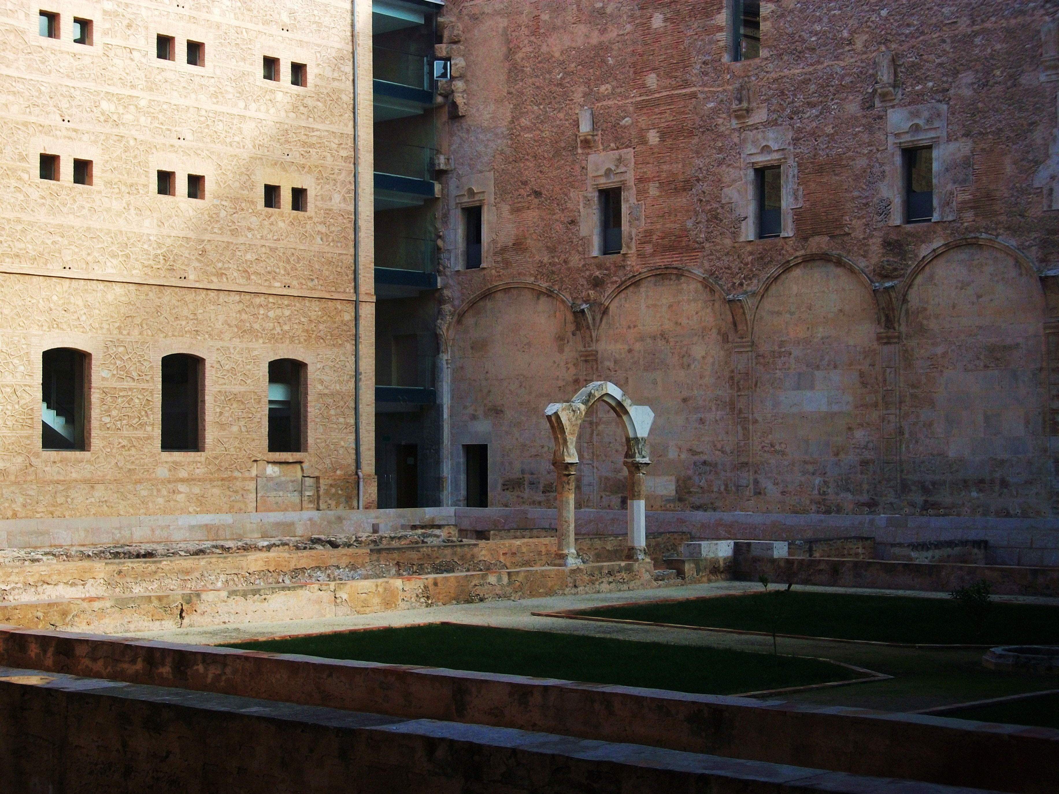 Restes del claustre del monestir de Sant Bernat de Rascanya dins del monestir de sant Miquel dels Reis, construit sobre aquest. L'arquet gòtic es recuperà en les excavacions arqueològiques fetes al monestir durant la seua rehabilitació. València.